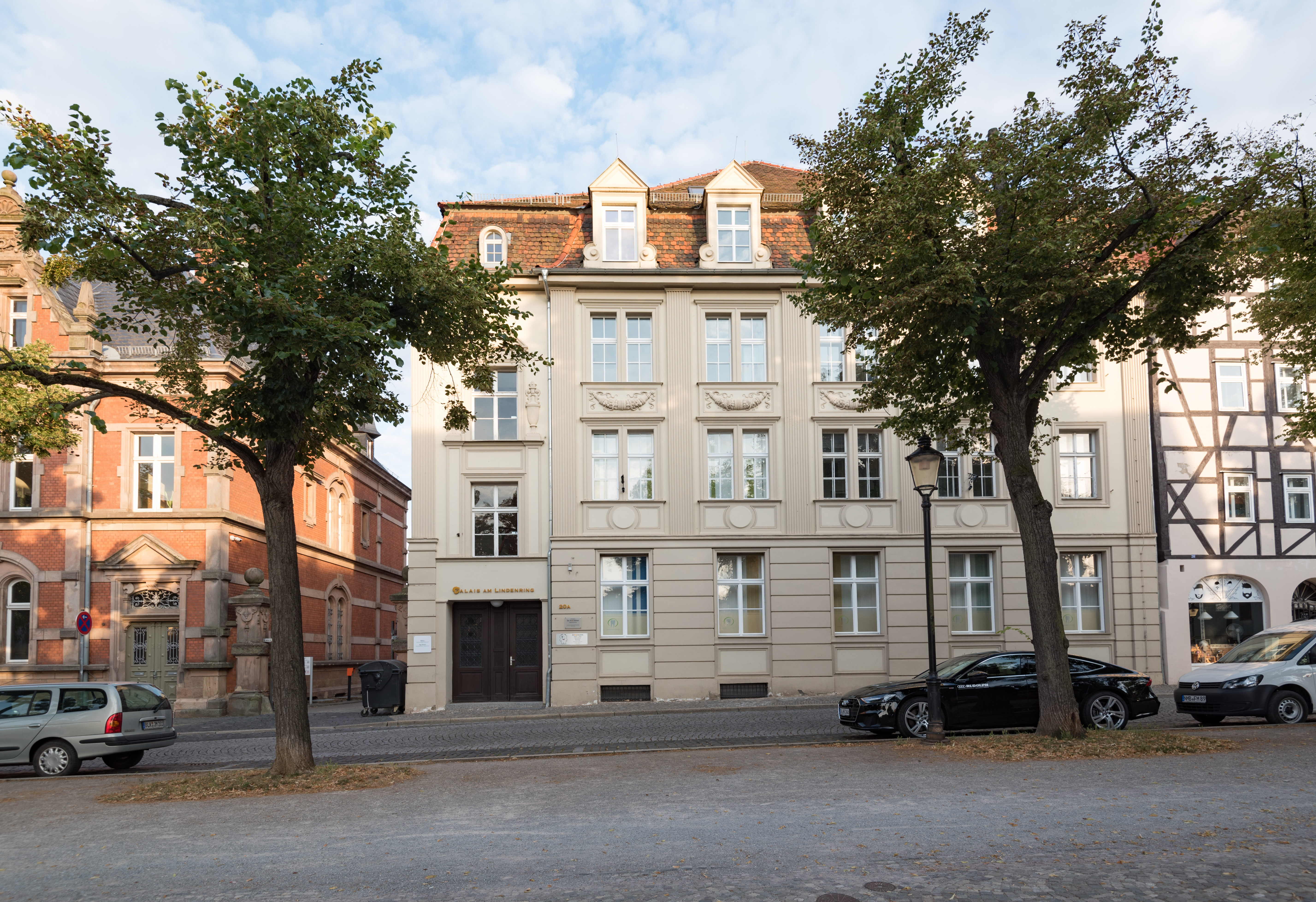 Naumburg (Saale), Lindenring 20a